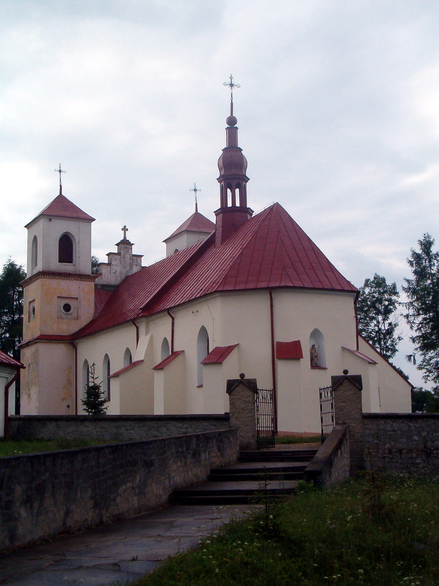 Kościół w Modliborzycach